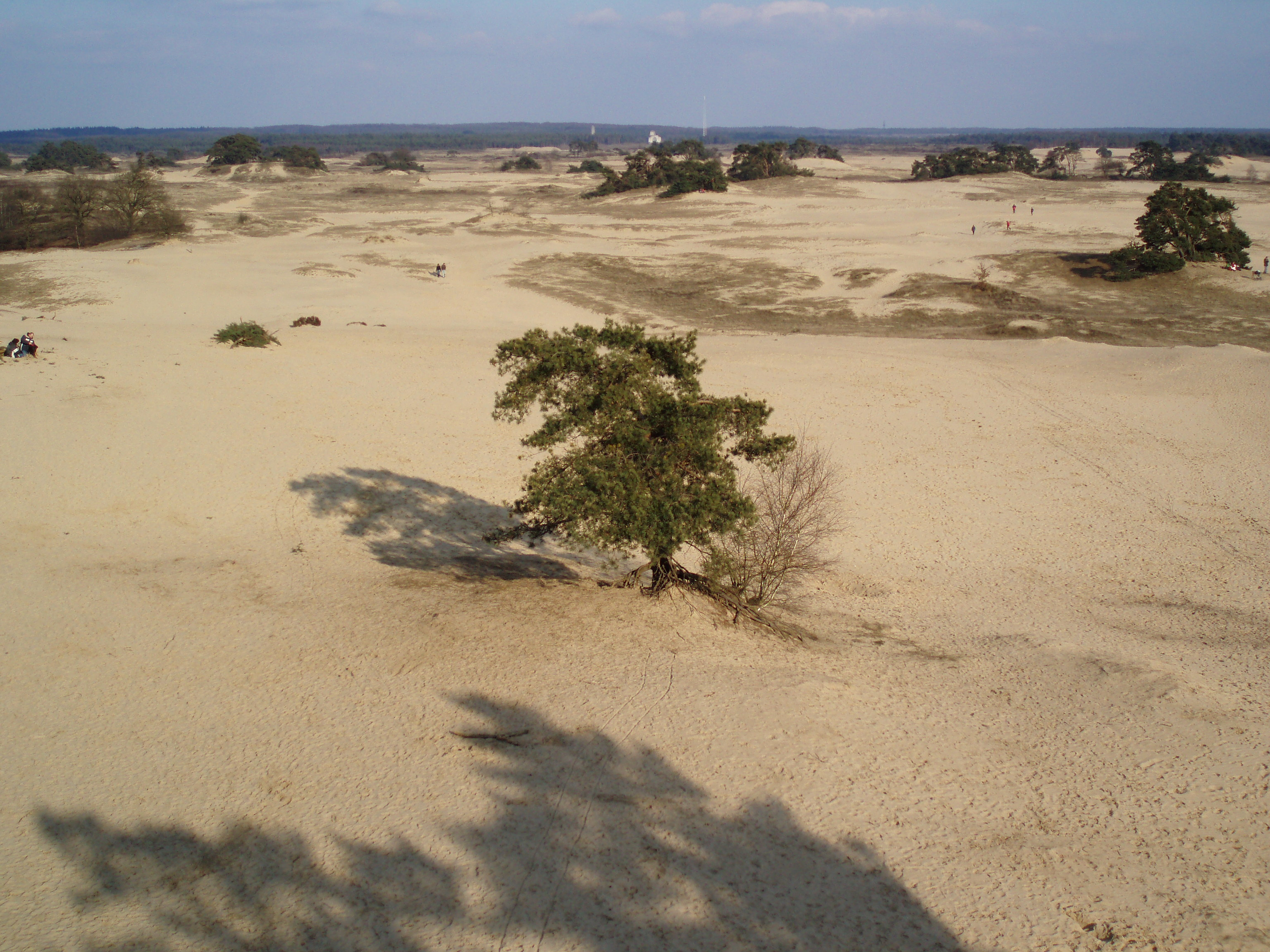 Het stuifzandgebied Kootwijkerzand in de bossen bij Kootwijk.